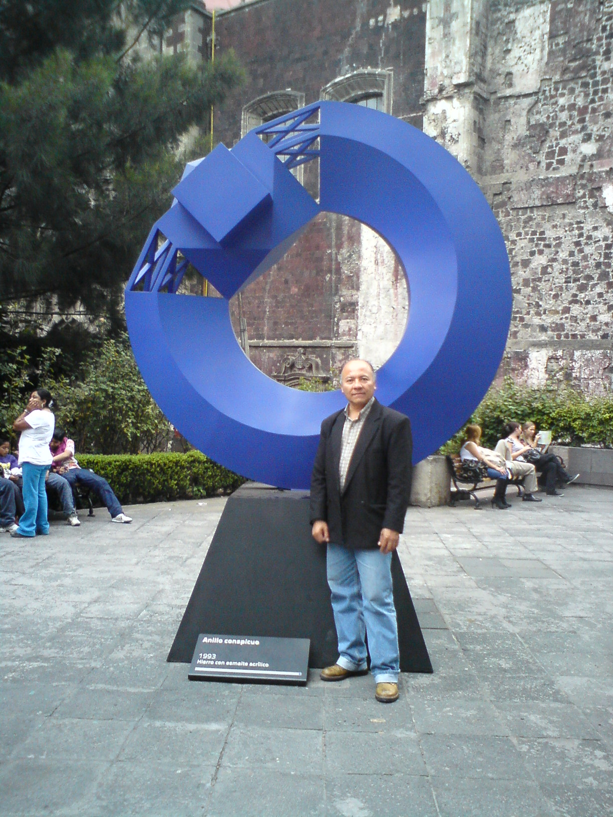 Eduardo Cerededo en Noviembre del 2011